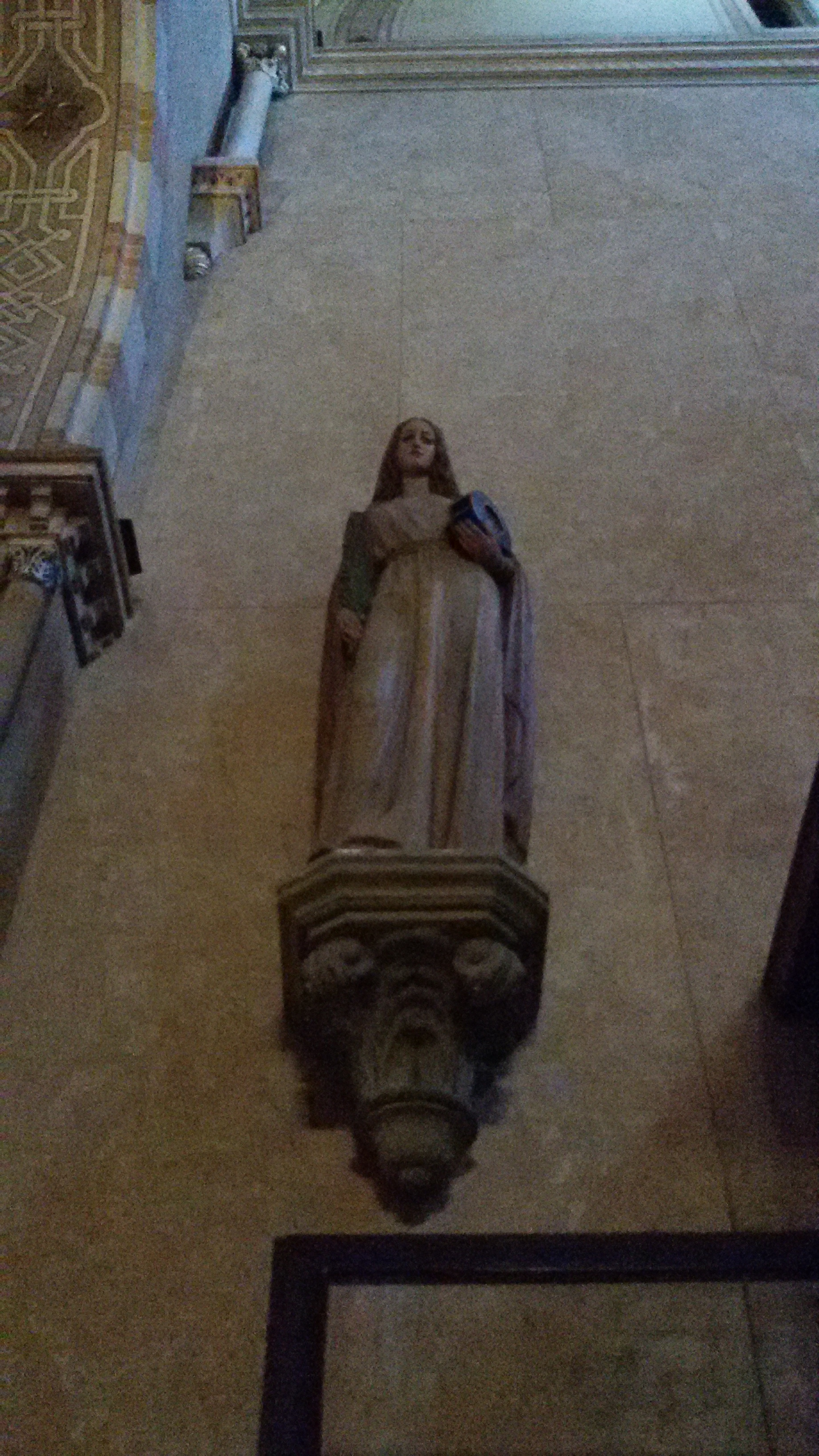 Chiesa di Santa Cristina Quinto di Treviso